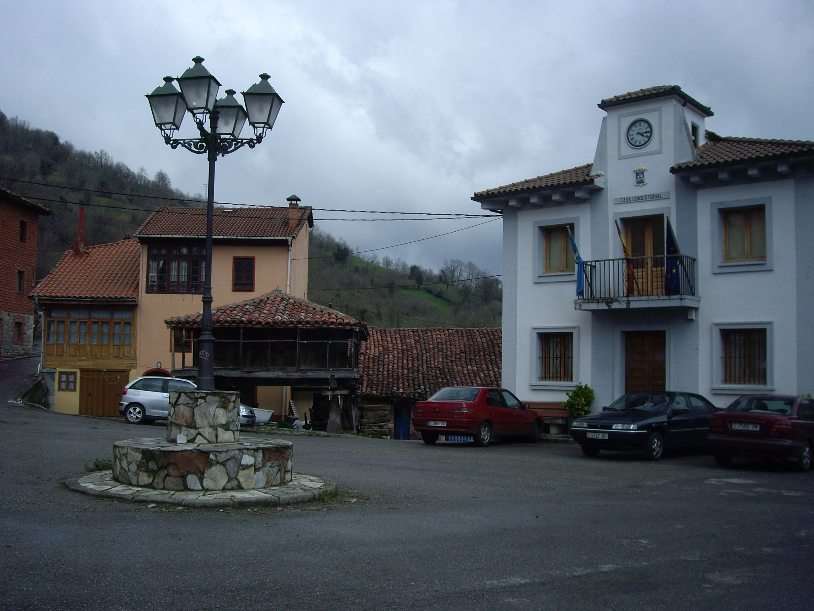 Plaza central del pueblo de Villabre, capital de concejo de Yernes y Tameza (Asturias)